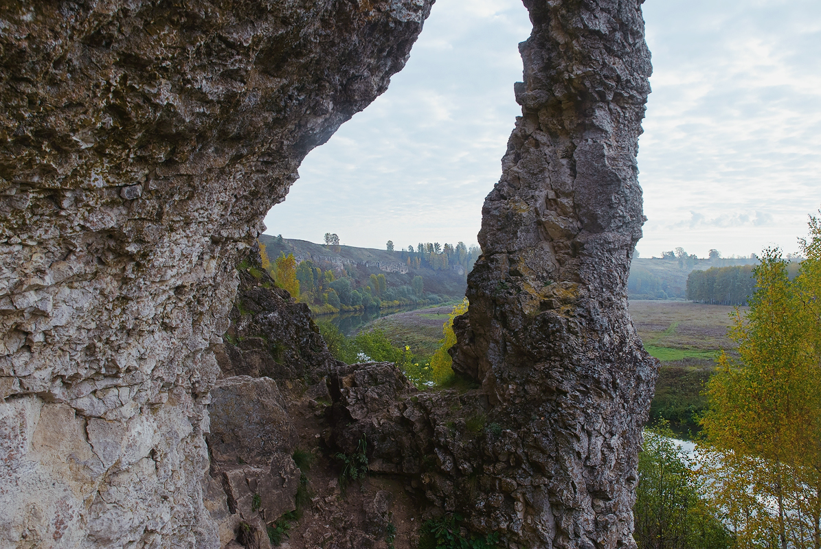 Чимбулатский ботанико-геологический комплекс: Находится на территории Колянурского сельского поселения Советского района на левом коренном берегу р.Немда ниже д.Чимбулат,Советский район, Кировская область This image is related to the protected area of Russia number 4310250